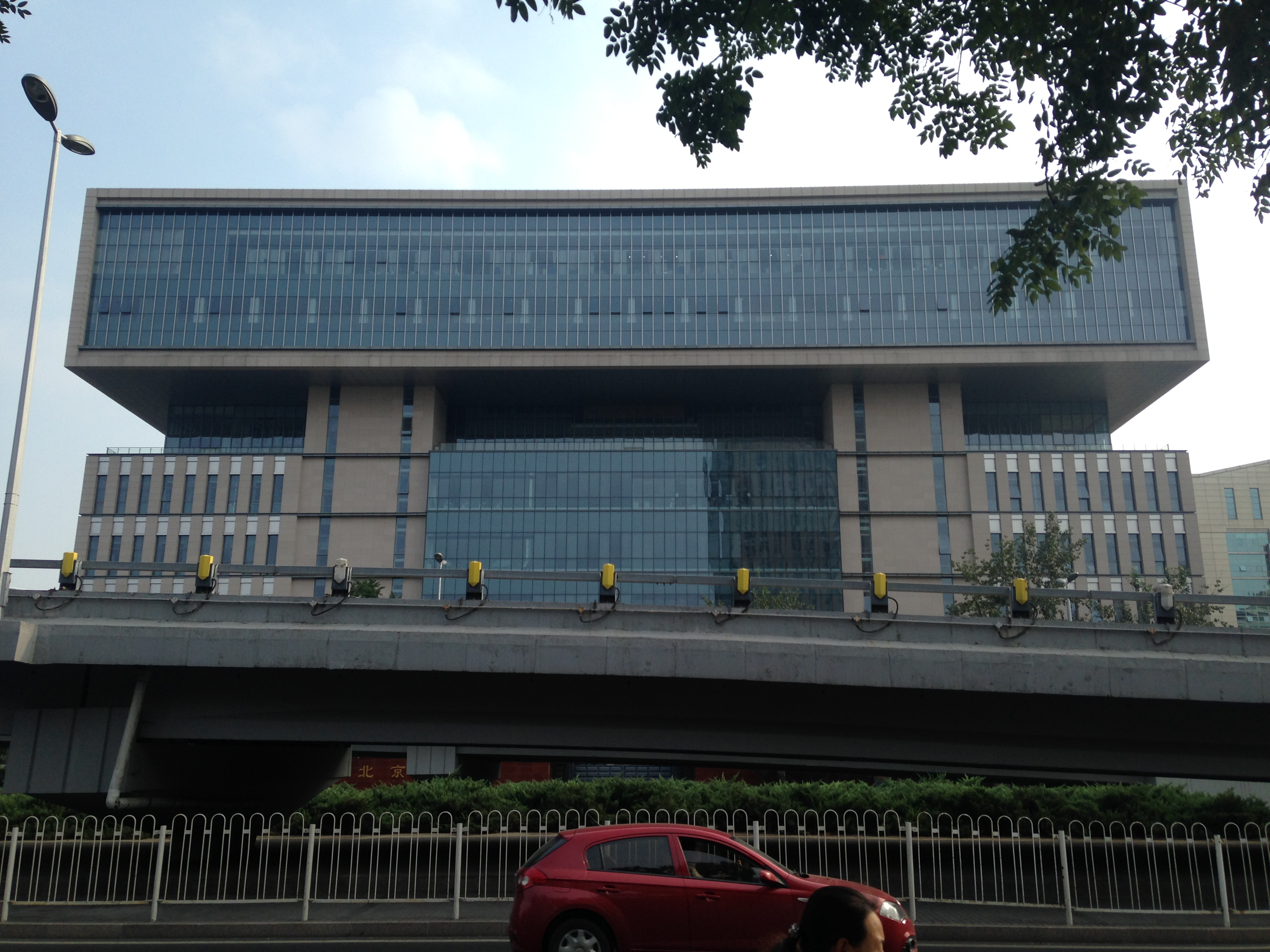 北京鉄路局